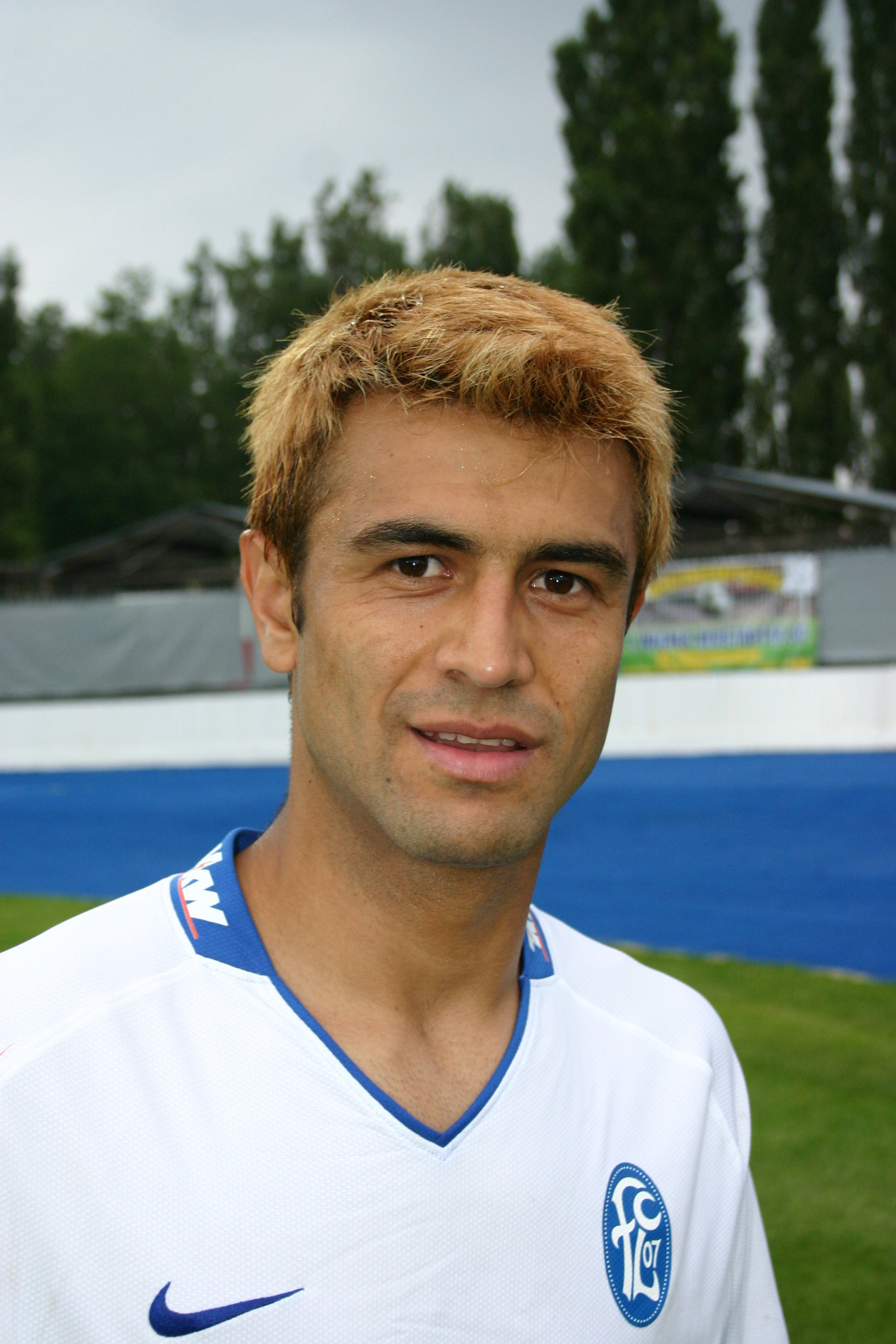 Vilmar da Cunha Rodrigues (Sabiá) (FC Lustenau 07)